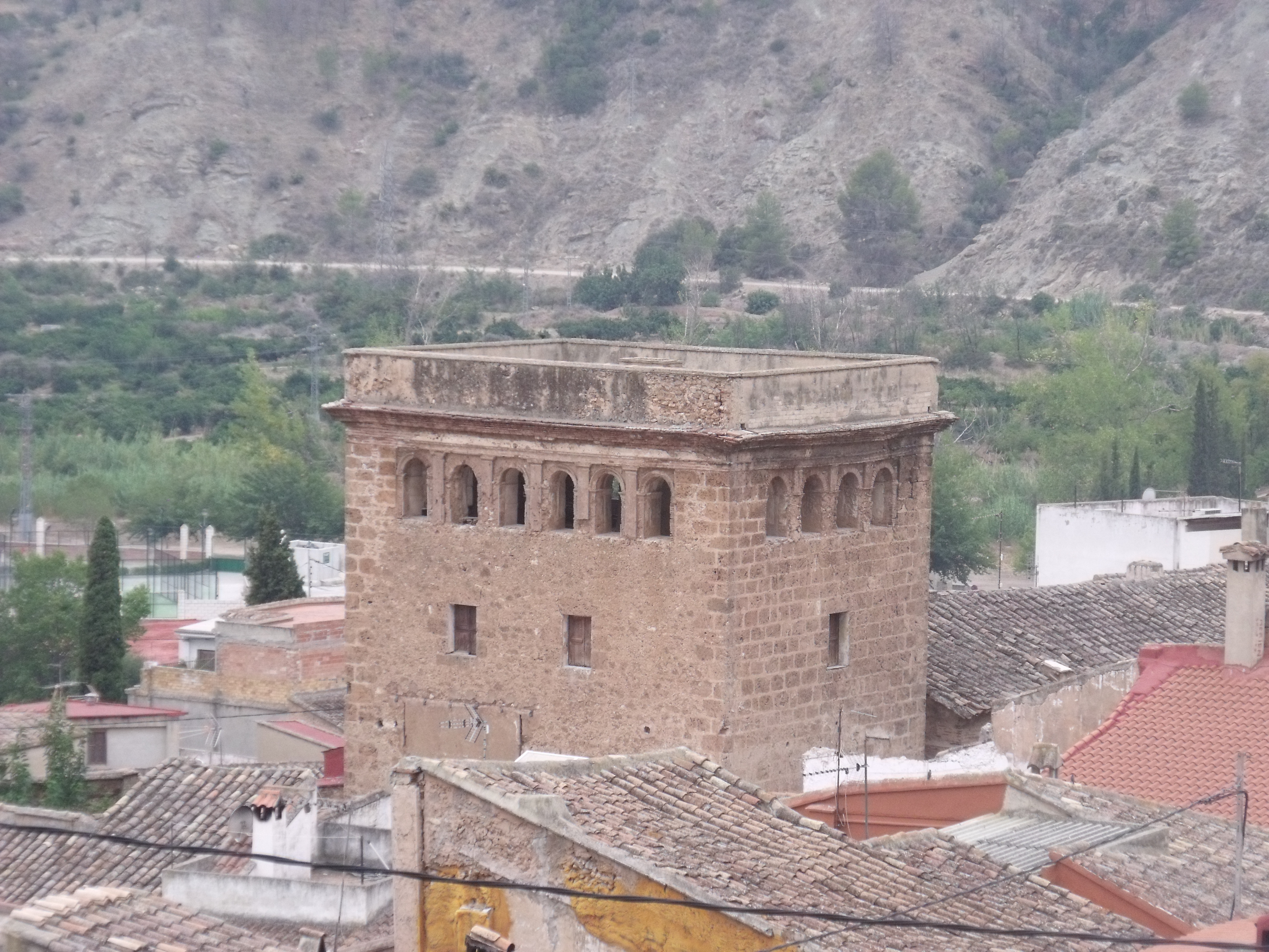 Palacio de los Señores de Gestalgar. Torre de planta rectangular.